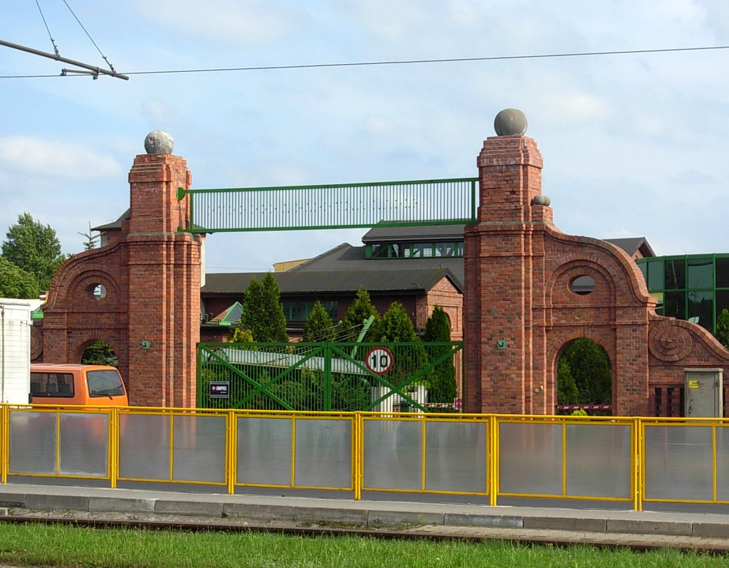 Telefonika Kable Bydgoszcz